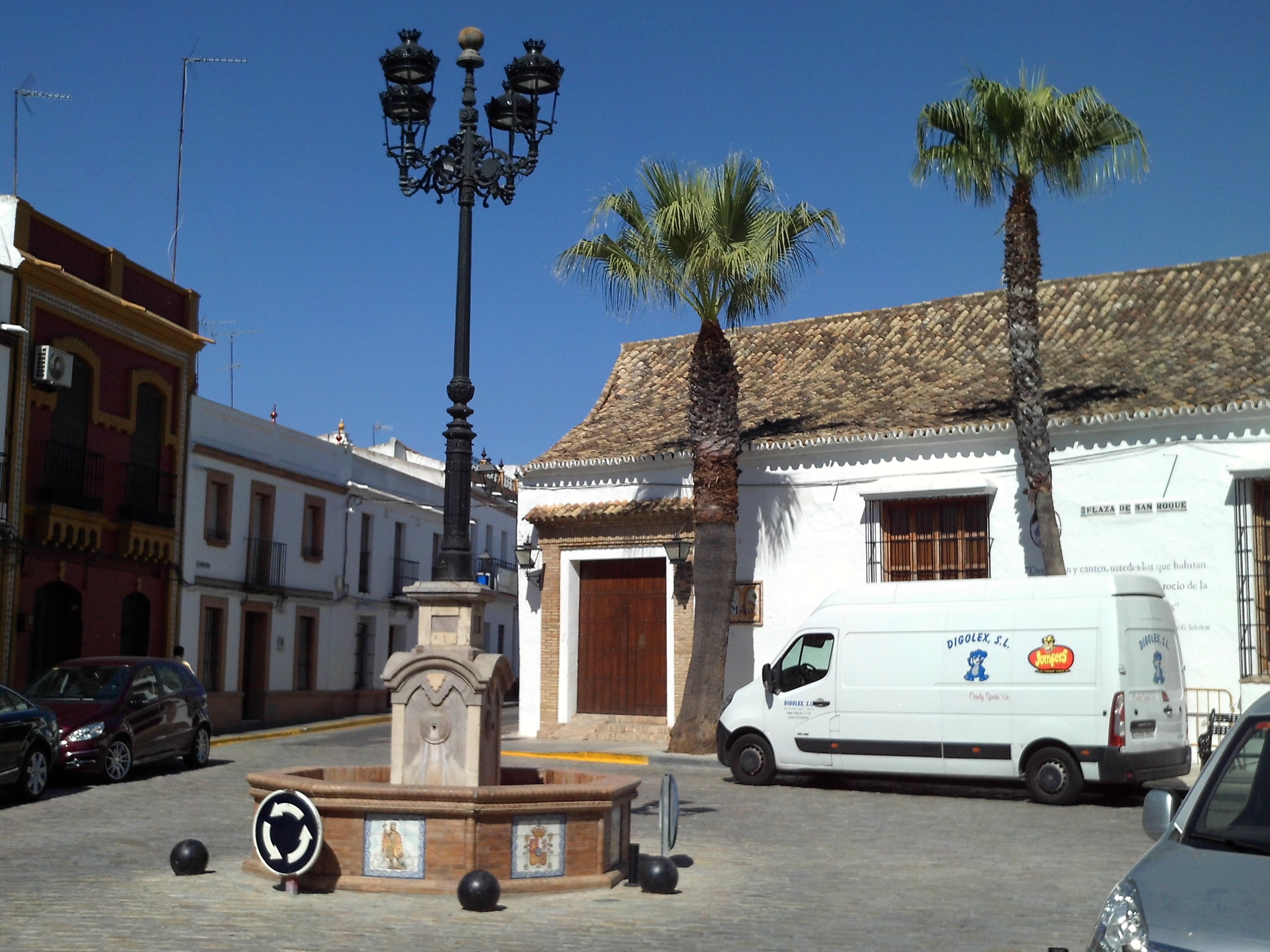 Plaza de San Roque, Villamanrique de la Condesa, provincia de Sevilla, Andalucía, España.